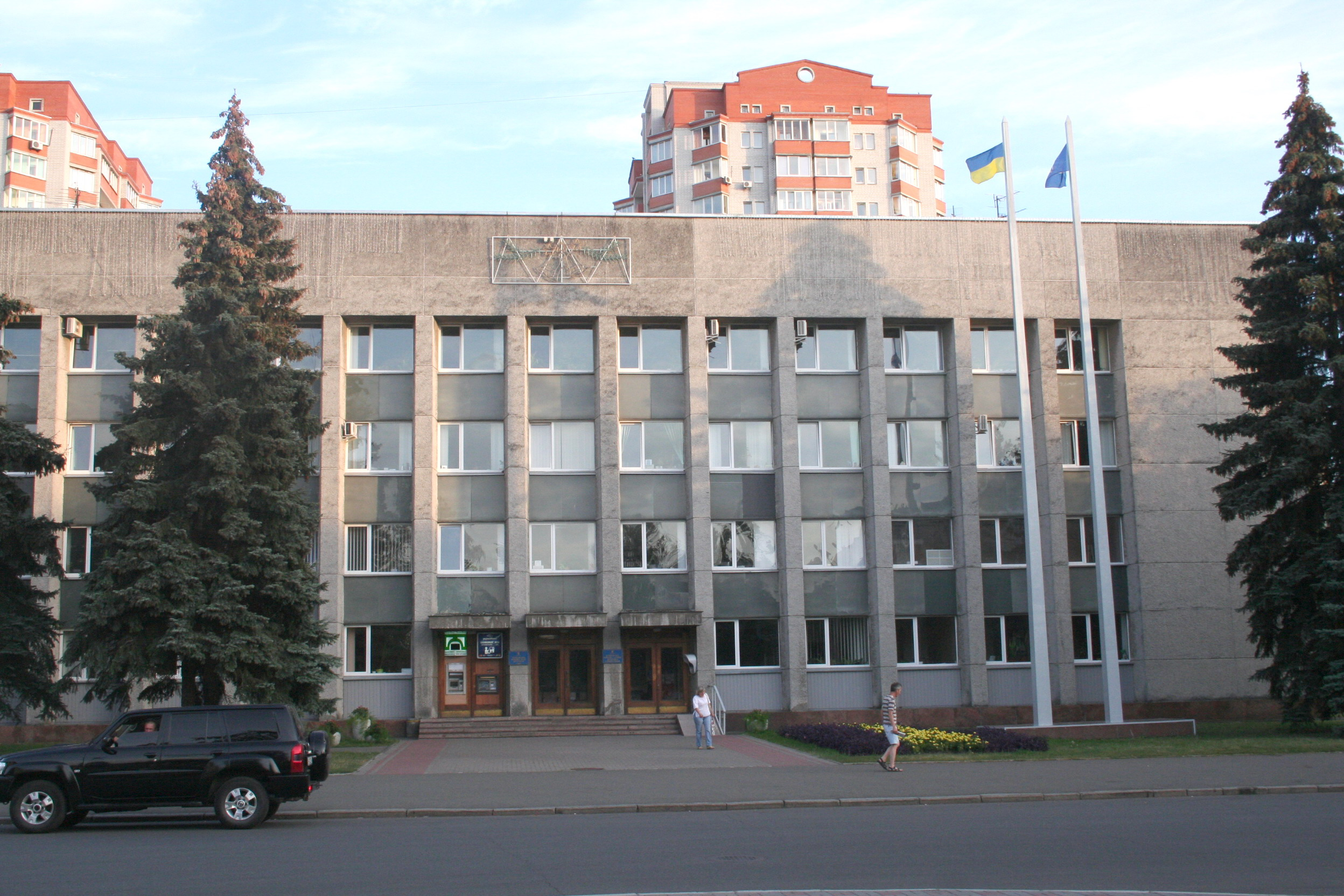 Фото 2011 року